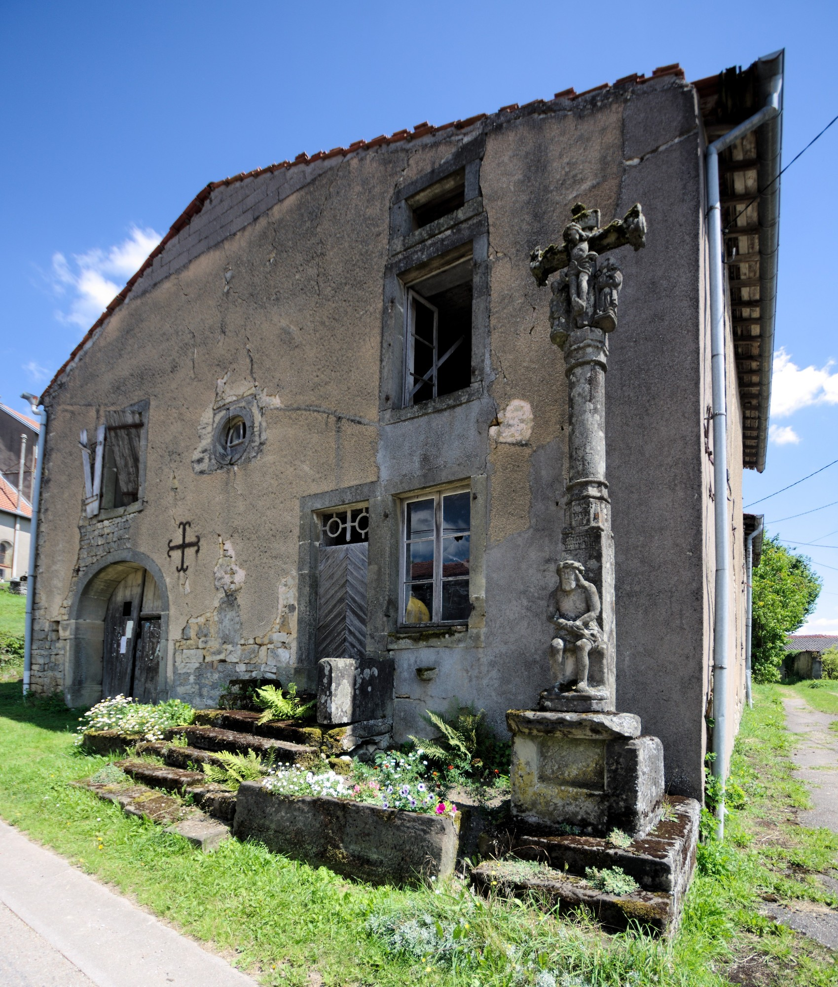 croix de carrefour, Ameuvelle, Vosges, France